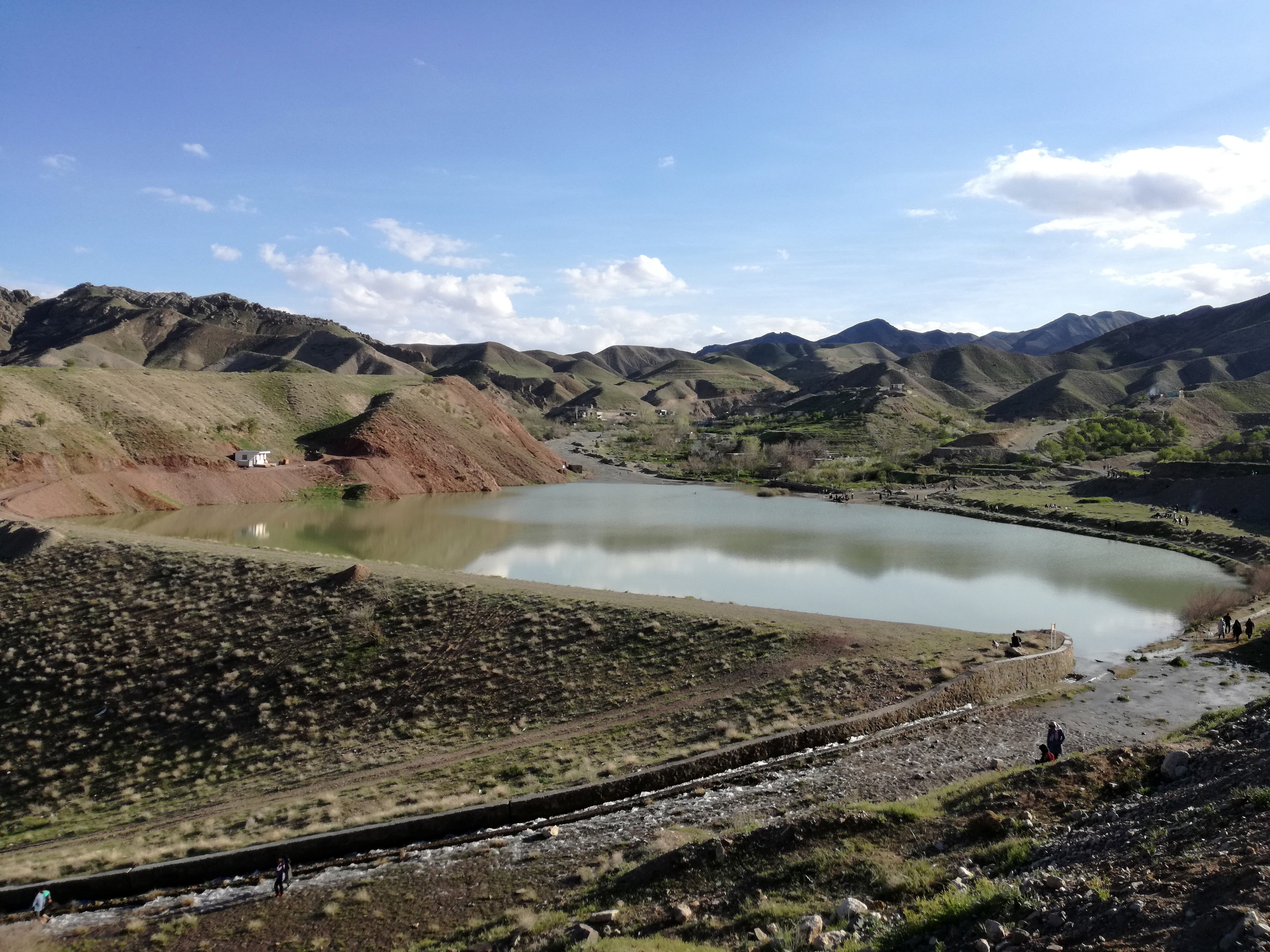 سد خاکی ششتمد، سبزوار